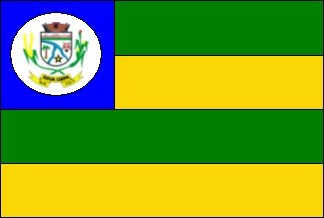 Bandeira do município goiano Água Limpa